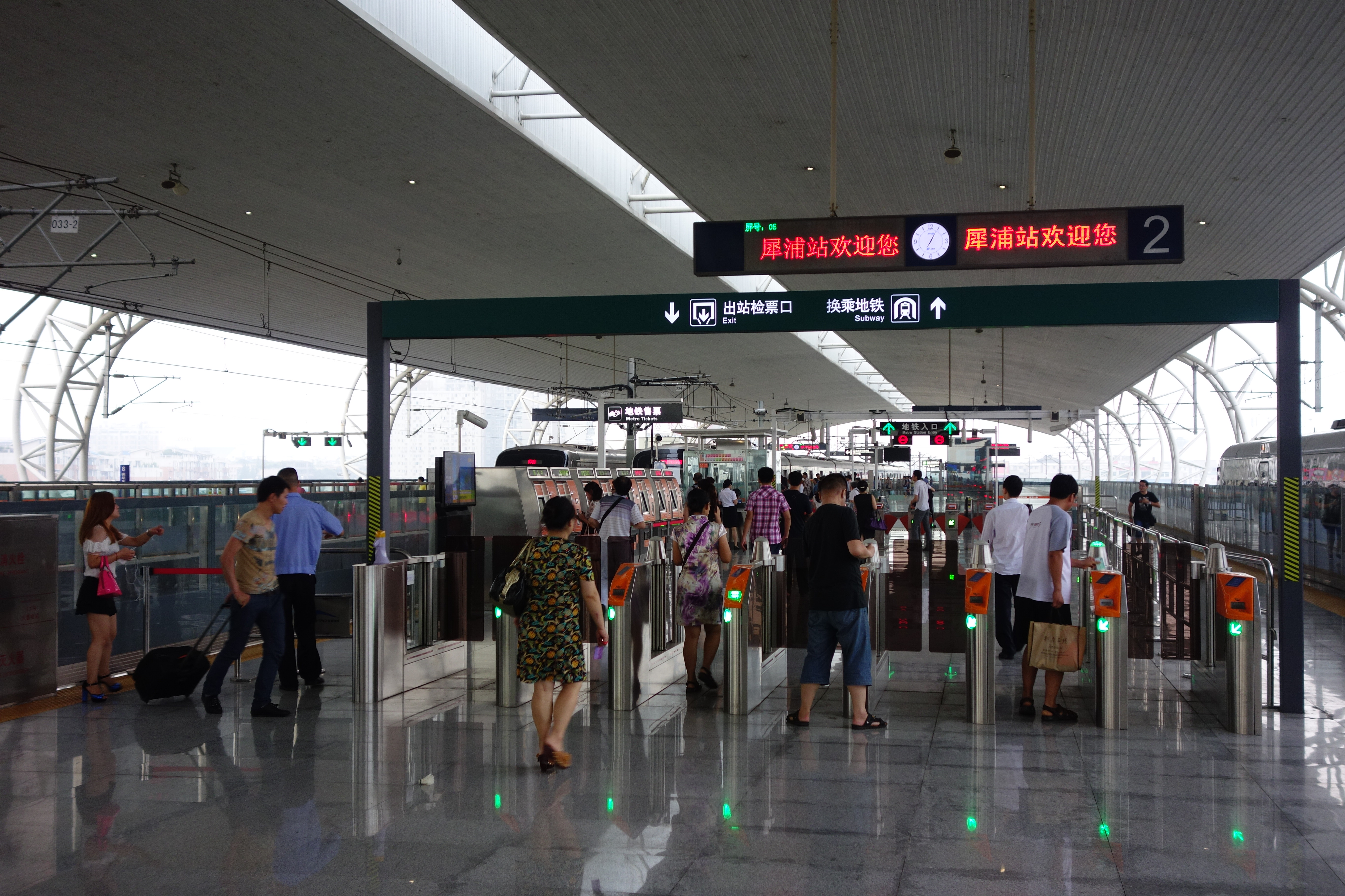 犀浦站国铁向地铁同台换乘口